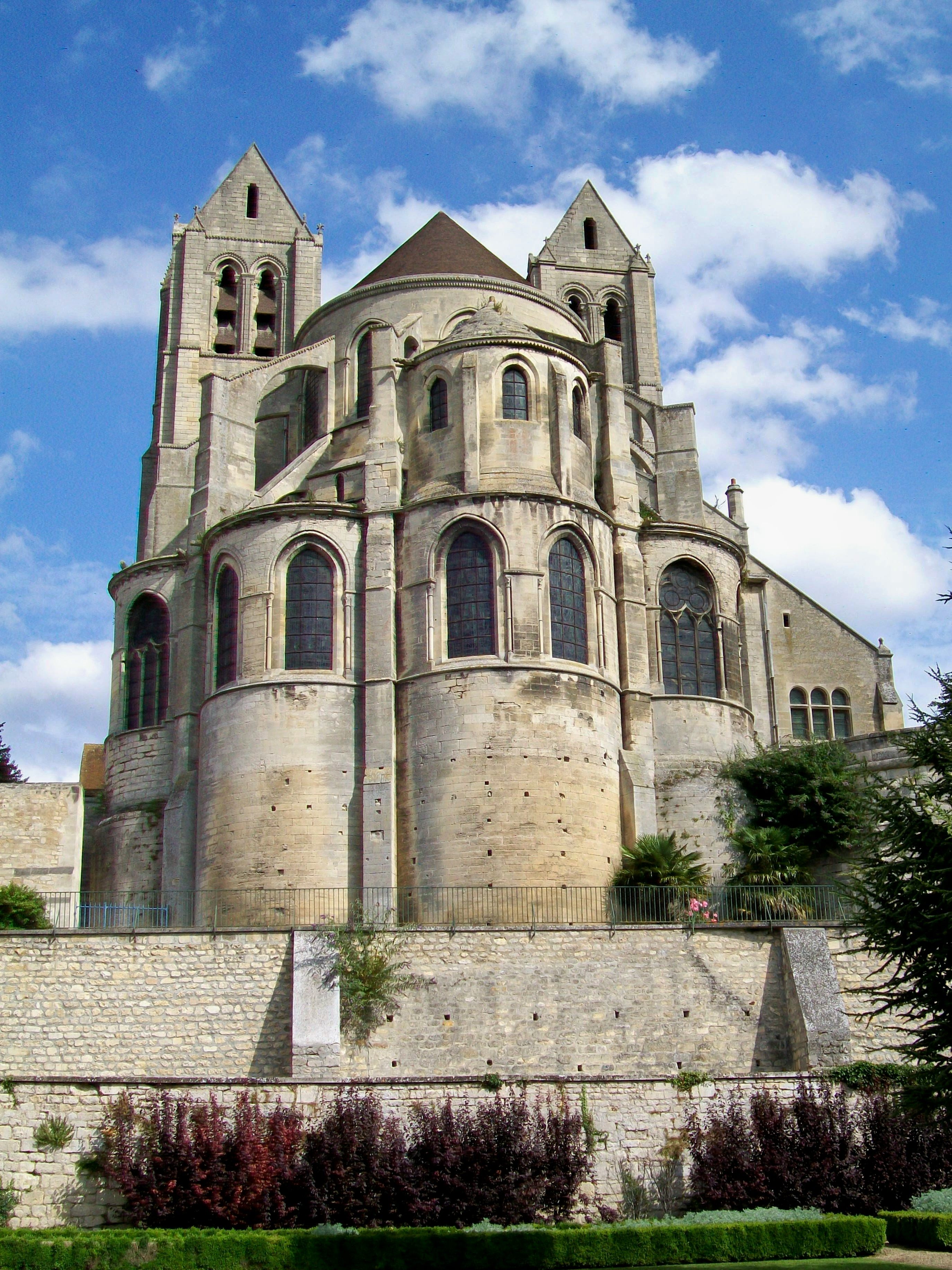 L'abbatiale vue depuis l'est (parc derrière le château de la Guesdière).